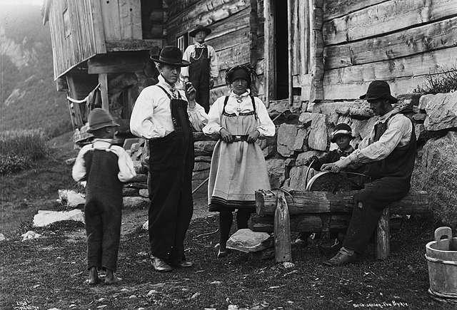 Ljåsliping på eit tun i Bykle